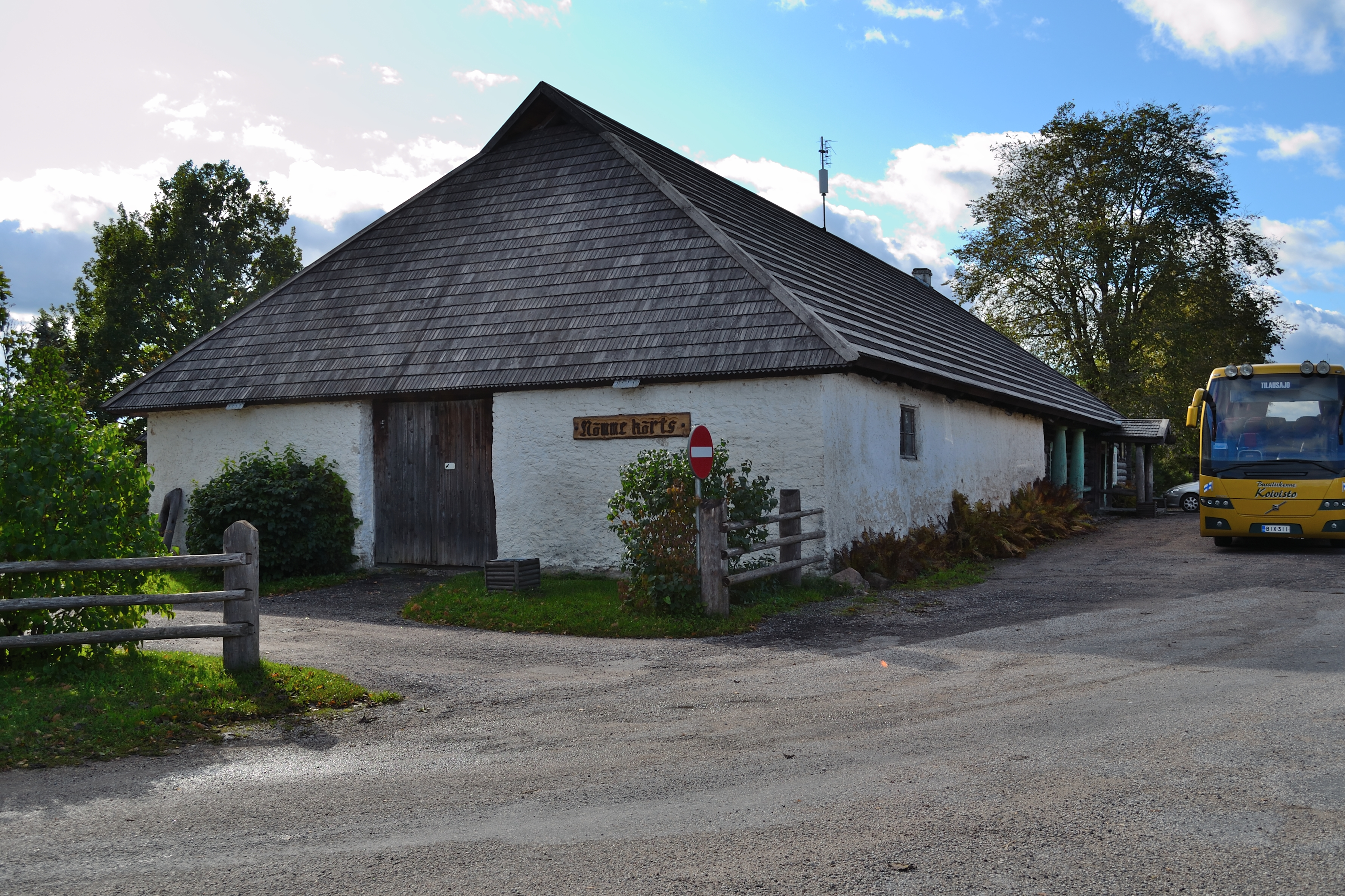 Nõmme kõrts, Raplamaa